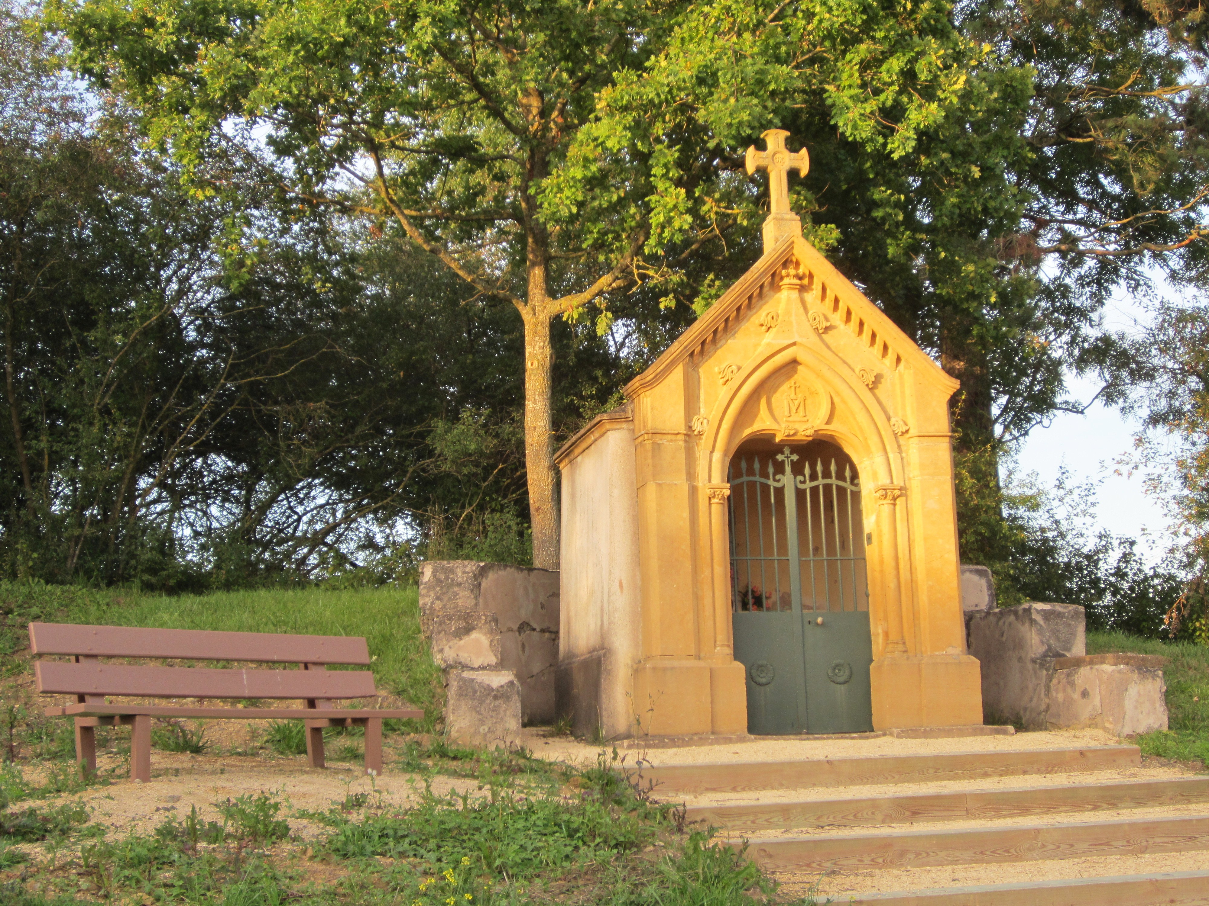 Description chapelle Hayotte chapelle Hayotte